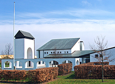 Skelager Kirke Skejby, Århus Nord, Denmark